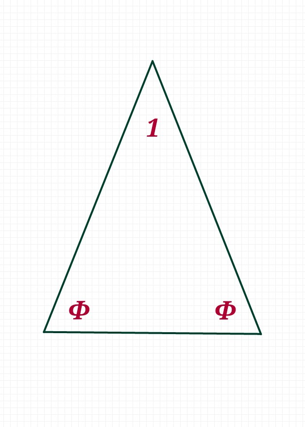 চিত্রটি চরম সমদ্বিবাহু ত্রিভুজের যেখানে সোনালি অনুপাত (Φ : 1) যুক্ত দুই জোড়া কোণ বিদ্যমান। গণিতবিদ ক্লার্ক কিম্বার্লিং এর সংজ্ঞানুসারে সোনালি ত্রিভুজের কোণগুলো সোনালি অনুপাত যুক্ত হবে।